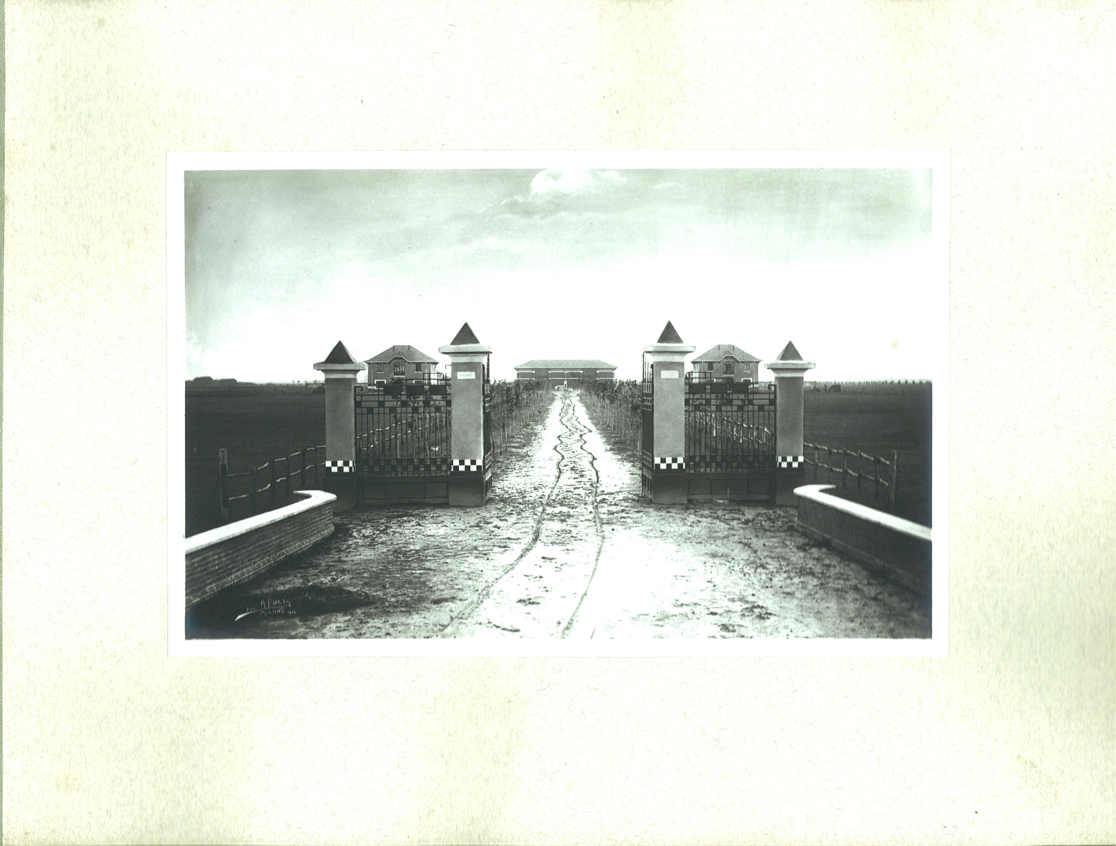 Foto presa dall'albo di fotografie dell'allevamento equino del Tramuschio di Foli A. Il Foli, fotografo milanese, è noto fra l'altro per le immagini da lui prese del funerale di Giuseppe Verdi.